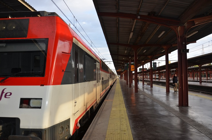 Train à quai, station Chamartin